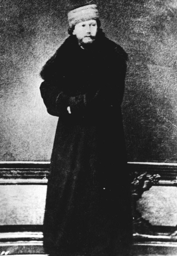 Ciaikovskij a 26 anni (fine 1866) a Mosca.